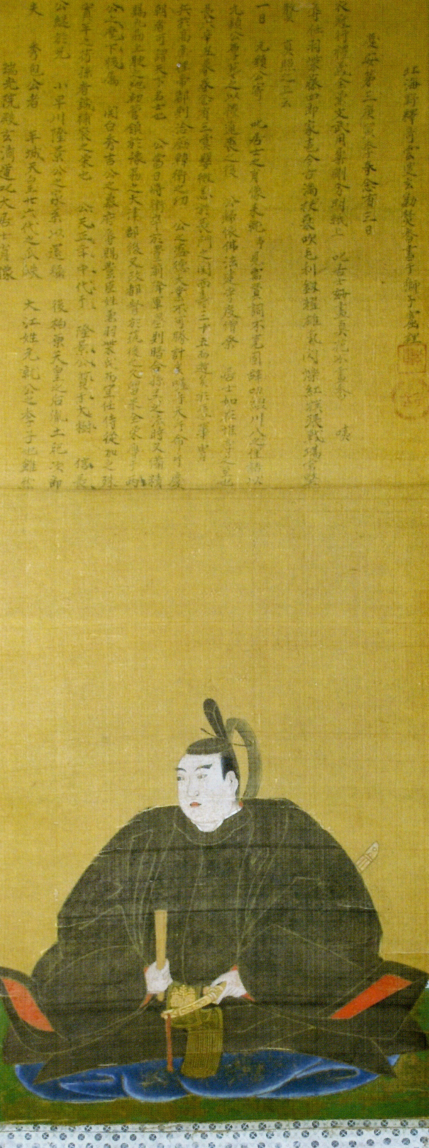 毛利秀包の肖像。